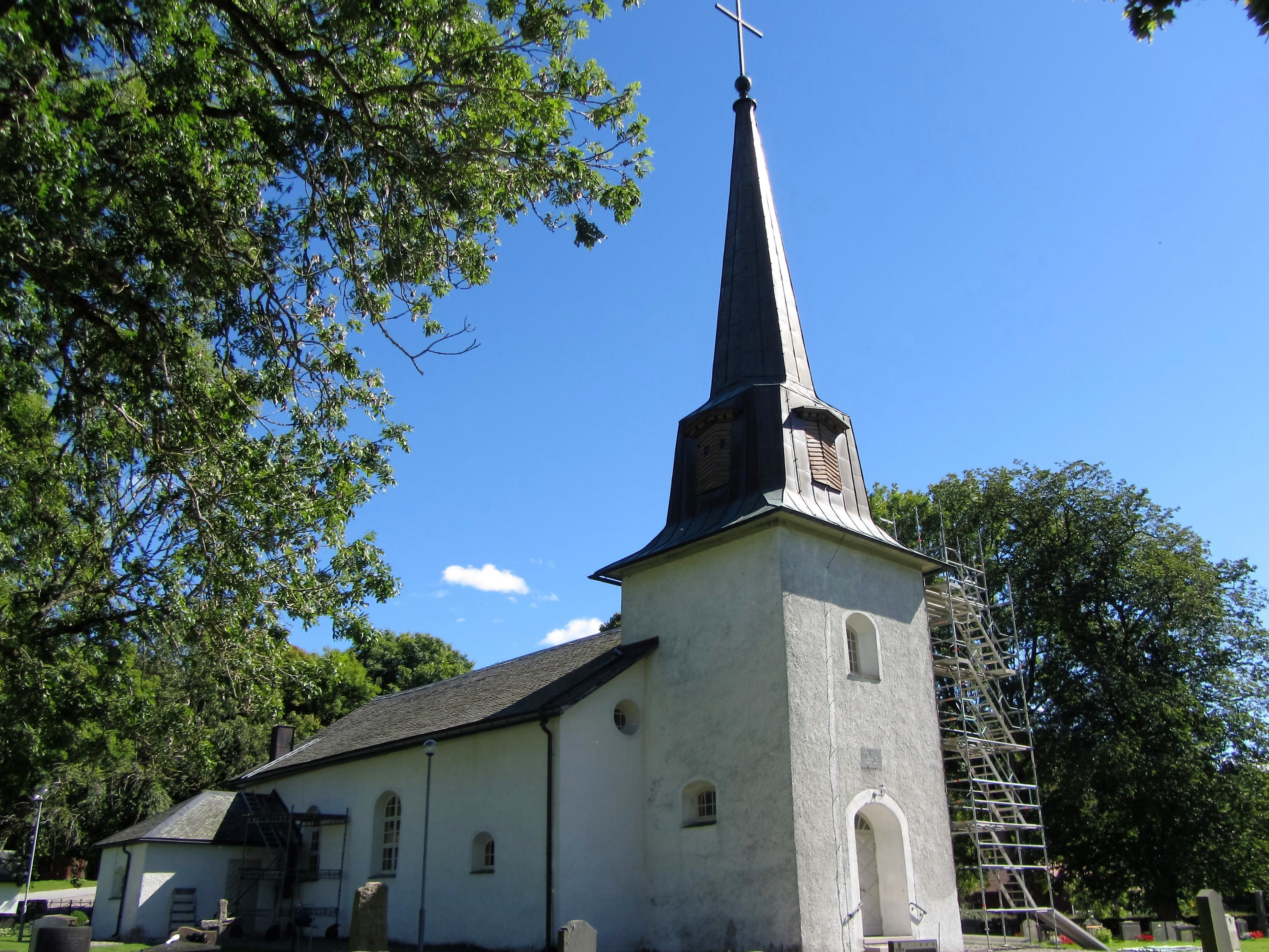 Järbo kyrka och kyrkogård i Dalsland.